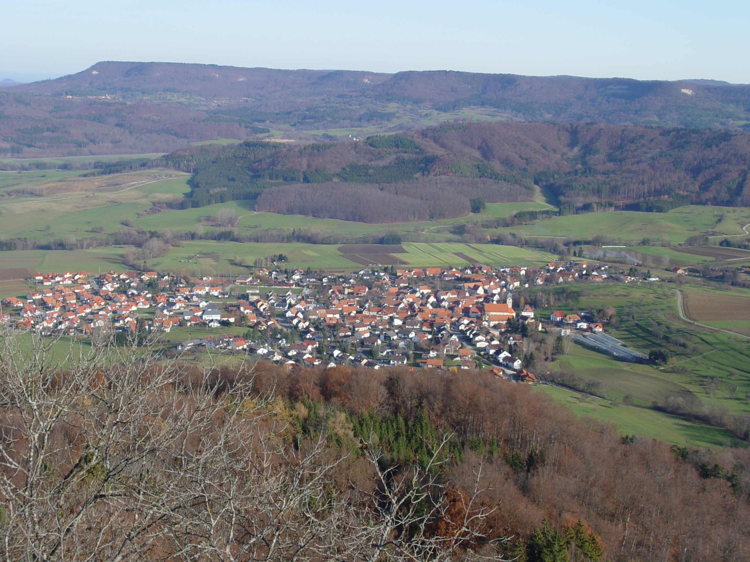 own work - Bild selbst gemacht Photographiert am 02.12.06 Hechingen-Boll von der Burg Hohenzollern aus gesehen (Im Hintergrund der Dreifürstenstein) Photographed by: Zollernalb